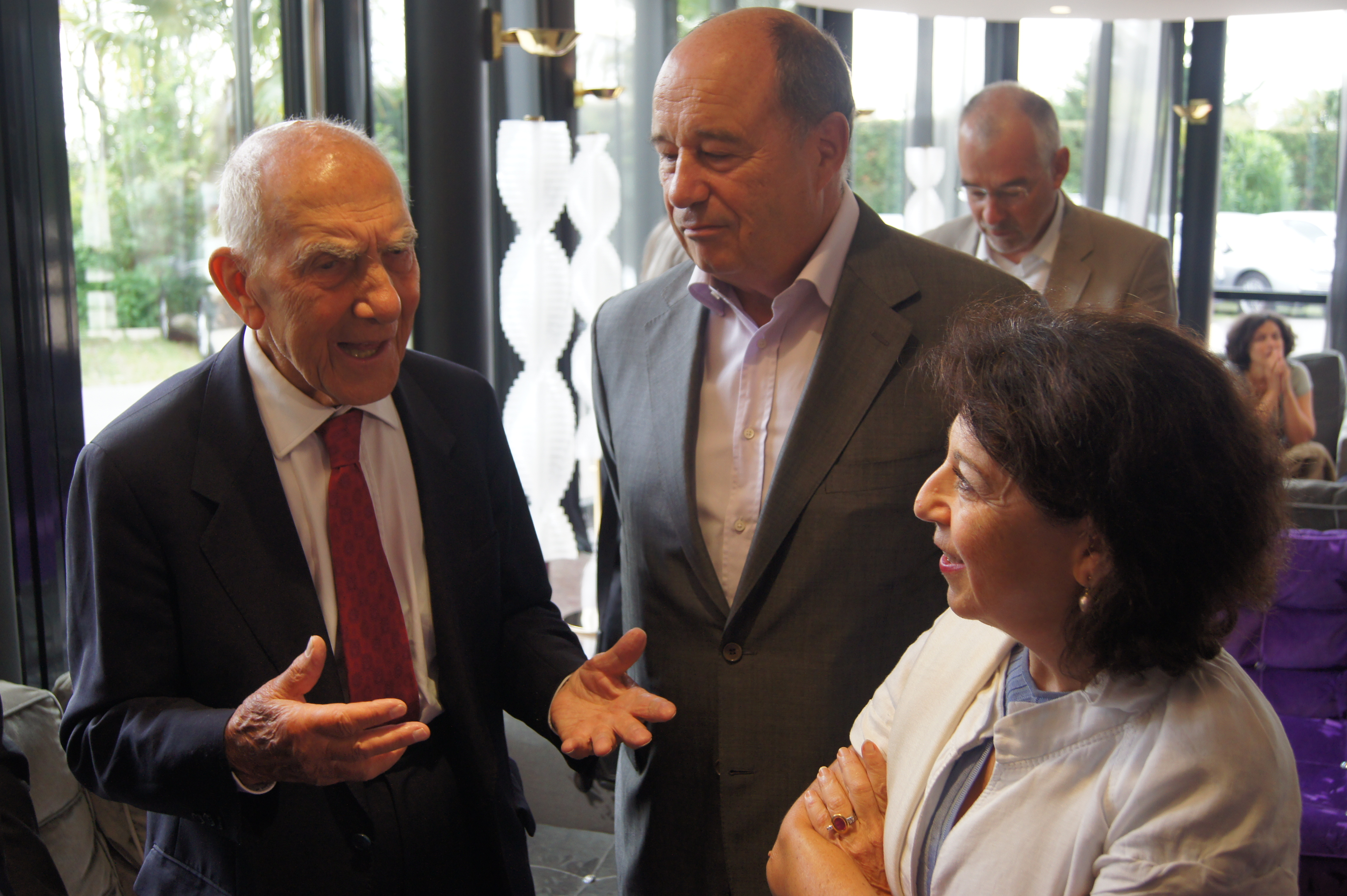 Rencontre des parlementaires avec sa sainteté le Dalaï Lama à Toulouse le 15 août 2011, avec Stéphane Hessel et Jean-Michel Baylet